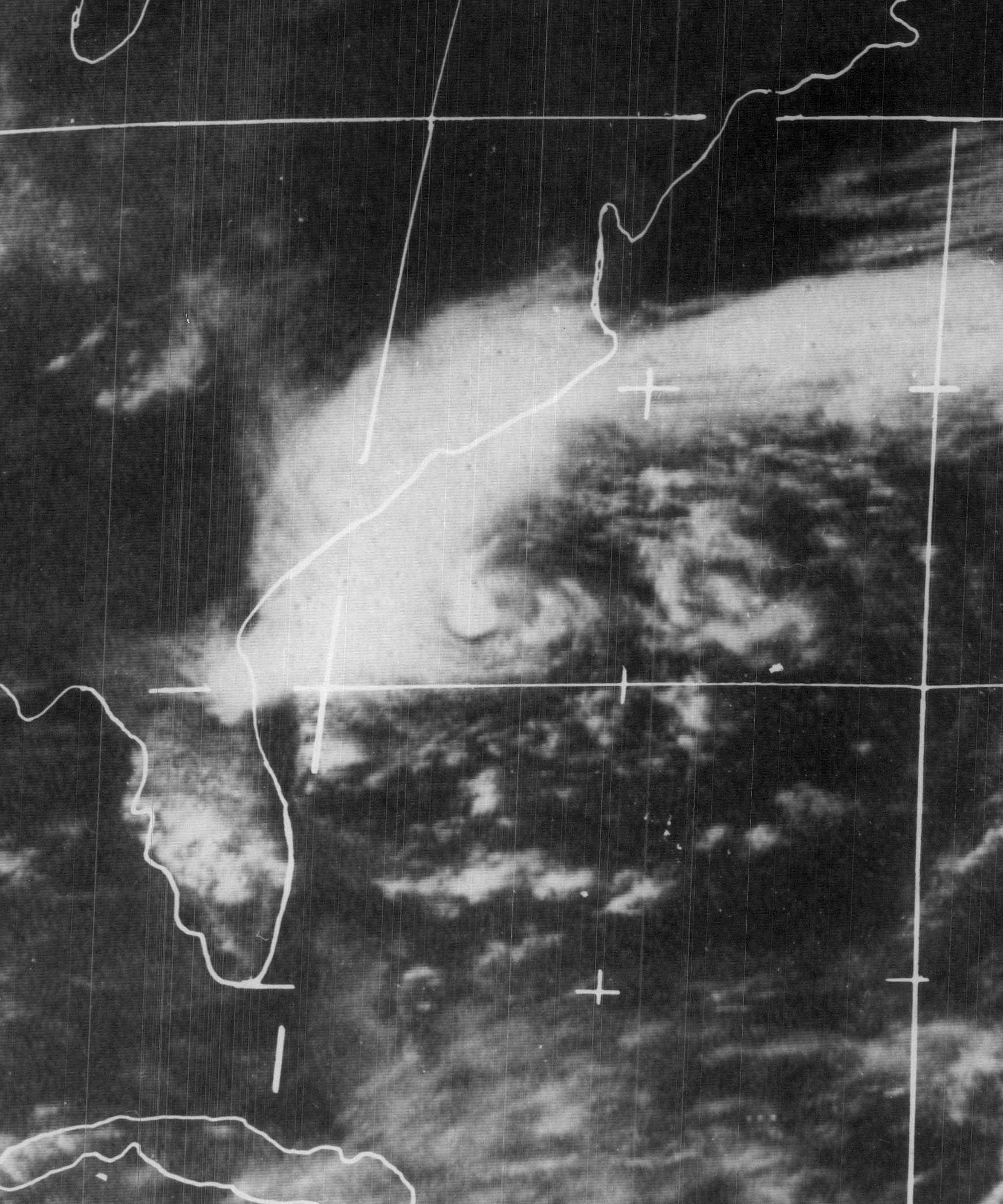 subtropical storm alpha northeast of florida in may 1972